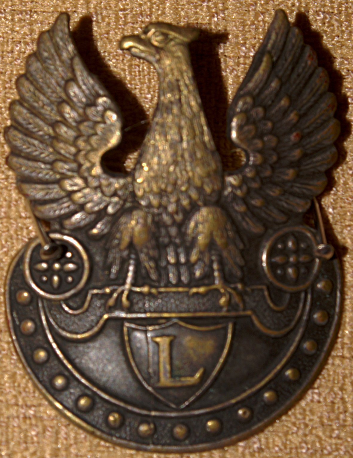 Mosiężny orzełek Legionów, bity w latach 1914-17, ze zbiorów Muzeum Hymnu Narodowego w Będominie.